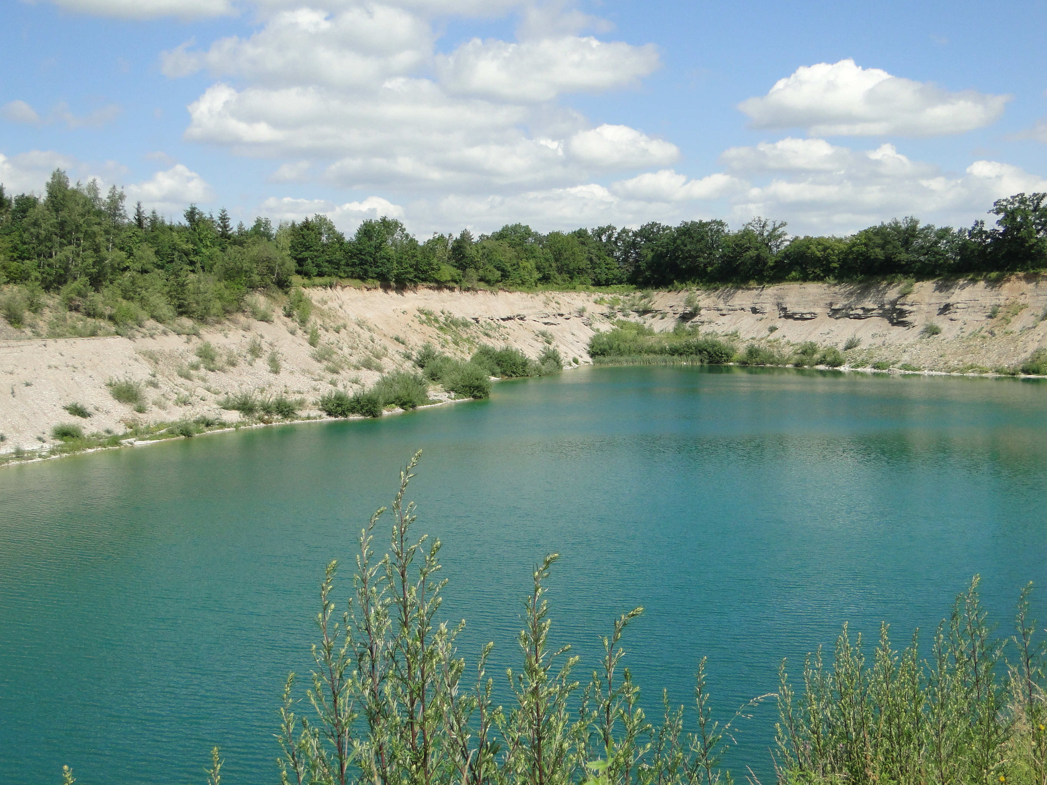 Grundwassersee / Baggersee in der Tiefen-Aitrach-Rinne